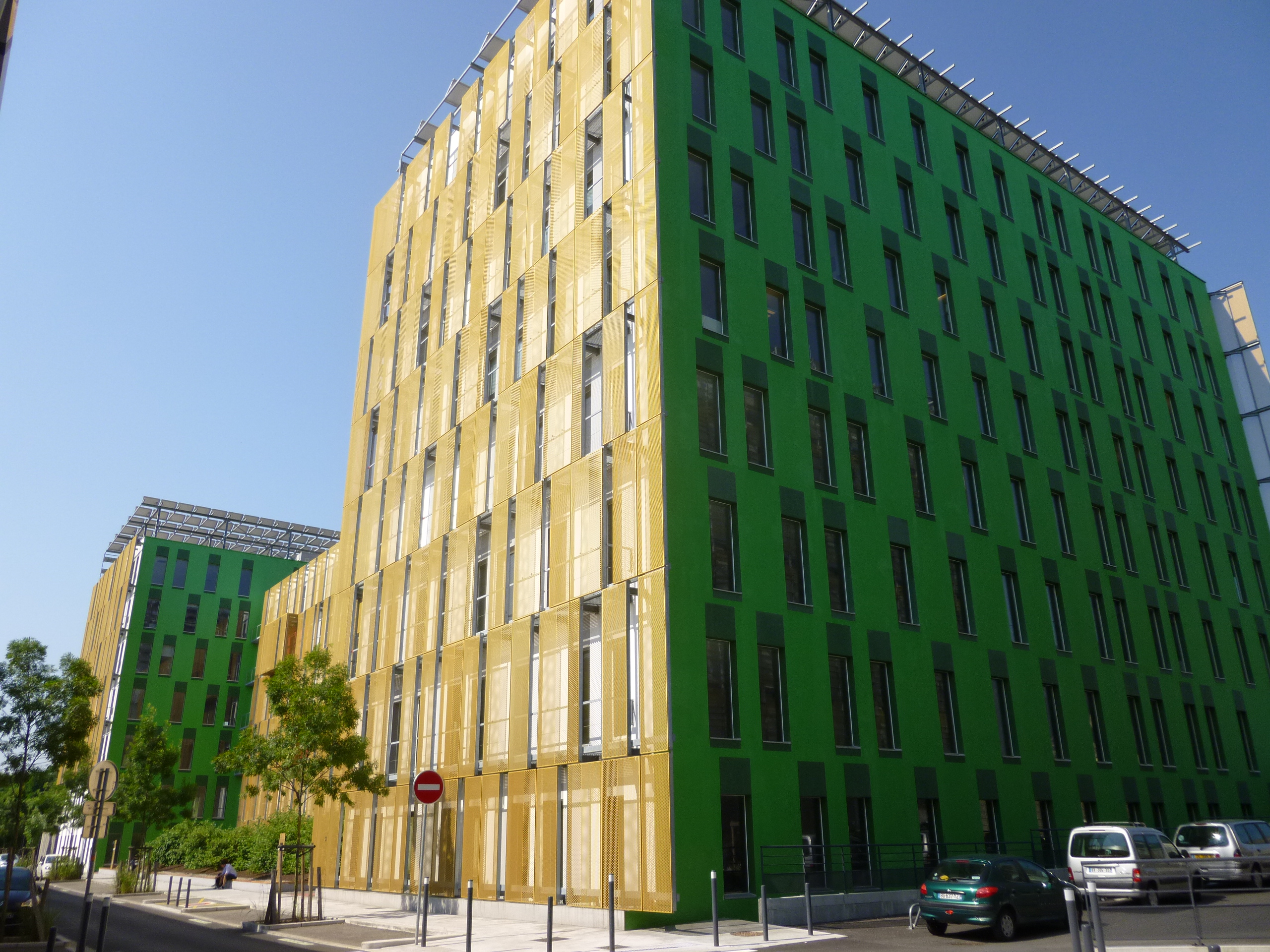 Immeuble de bureaux "Les reflets du Drac" dans le quartier Bouchayer-Viallet à Grenoble